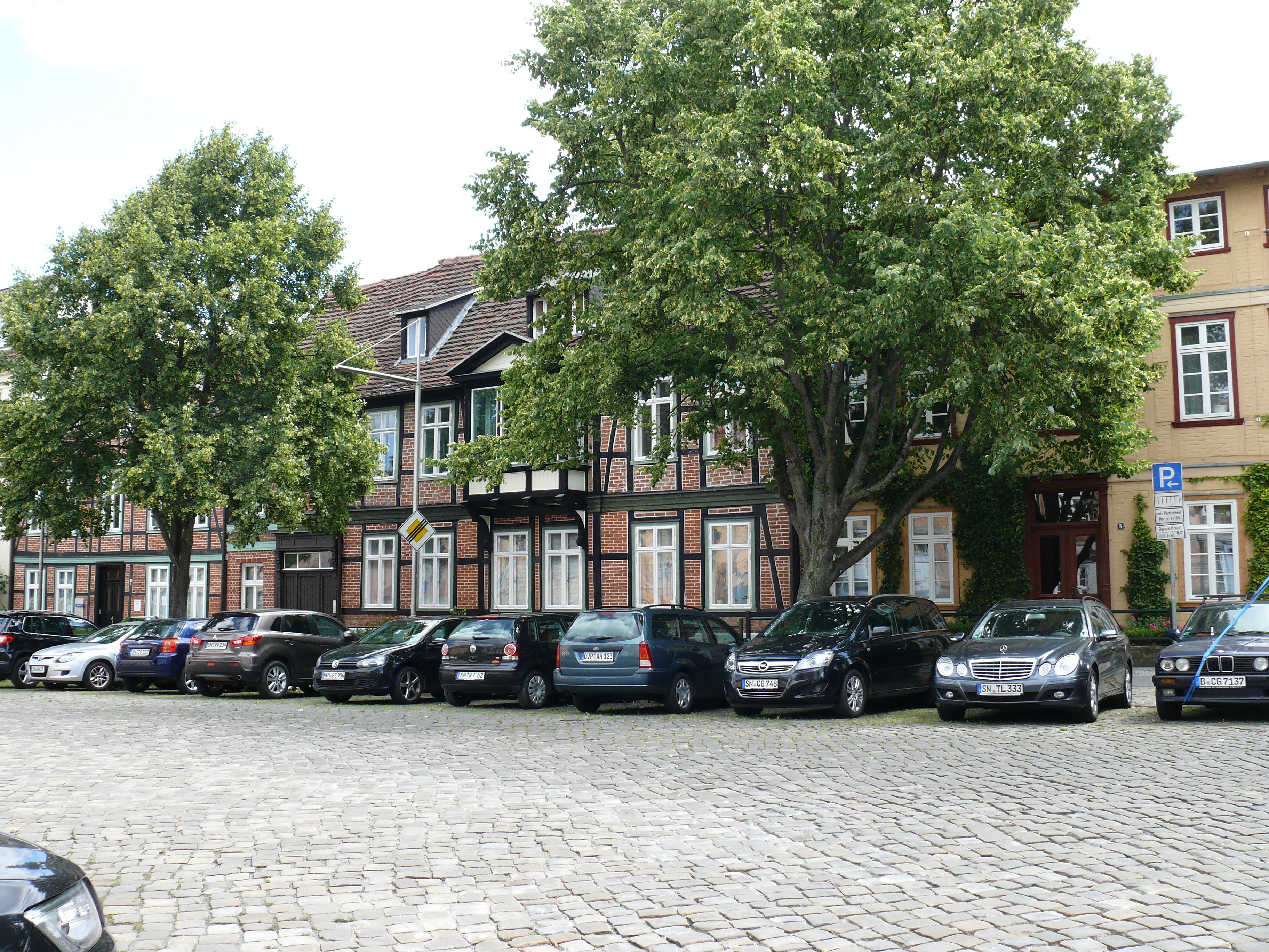 Die Gebäude "Schelfmarkt 5 (rechts) + 6 (links)" in Schwerin.